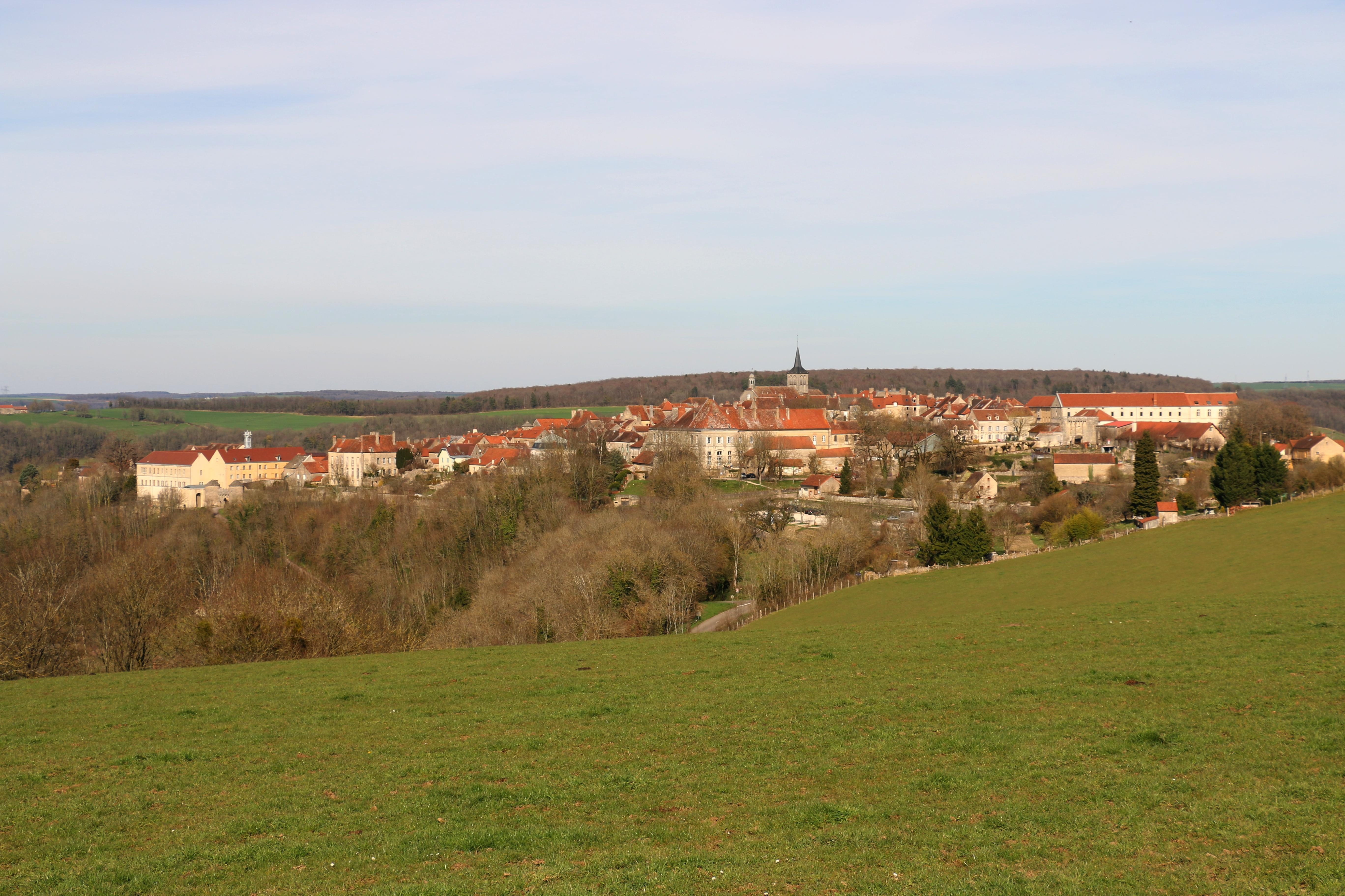 Flavigny-sur-Ozerain von Süden aus gesehen.